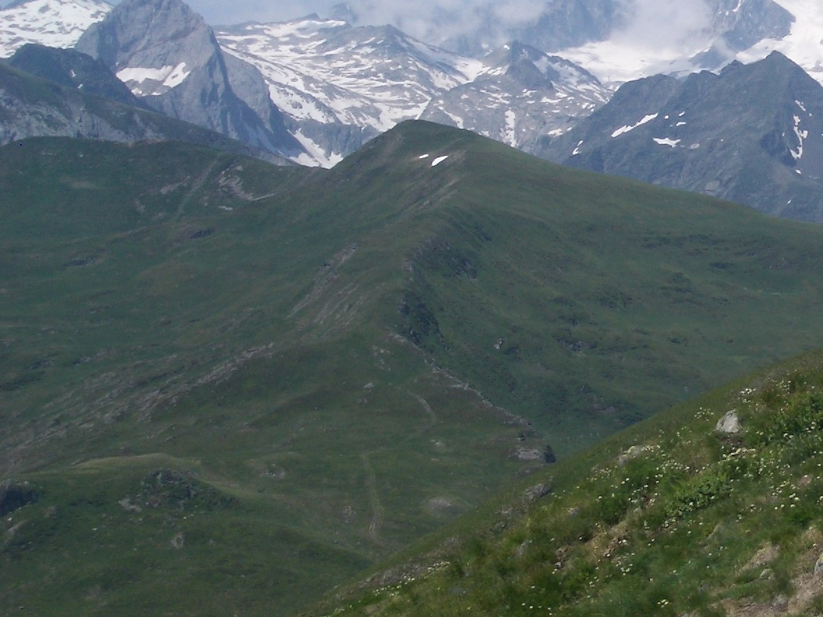 Vista del Pico de Montpius